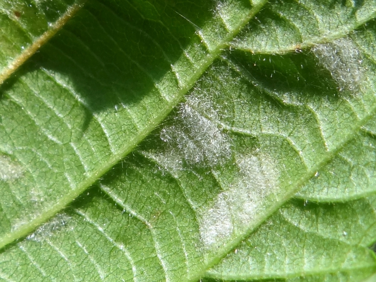 Podosphaera macularis on leaves Rubus sp.